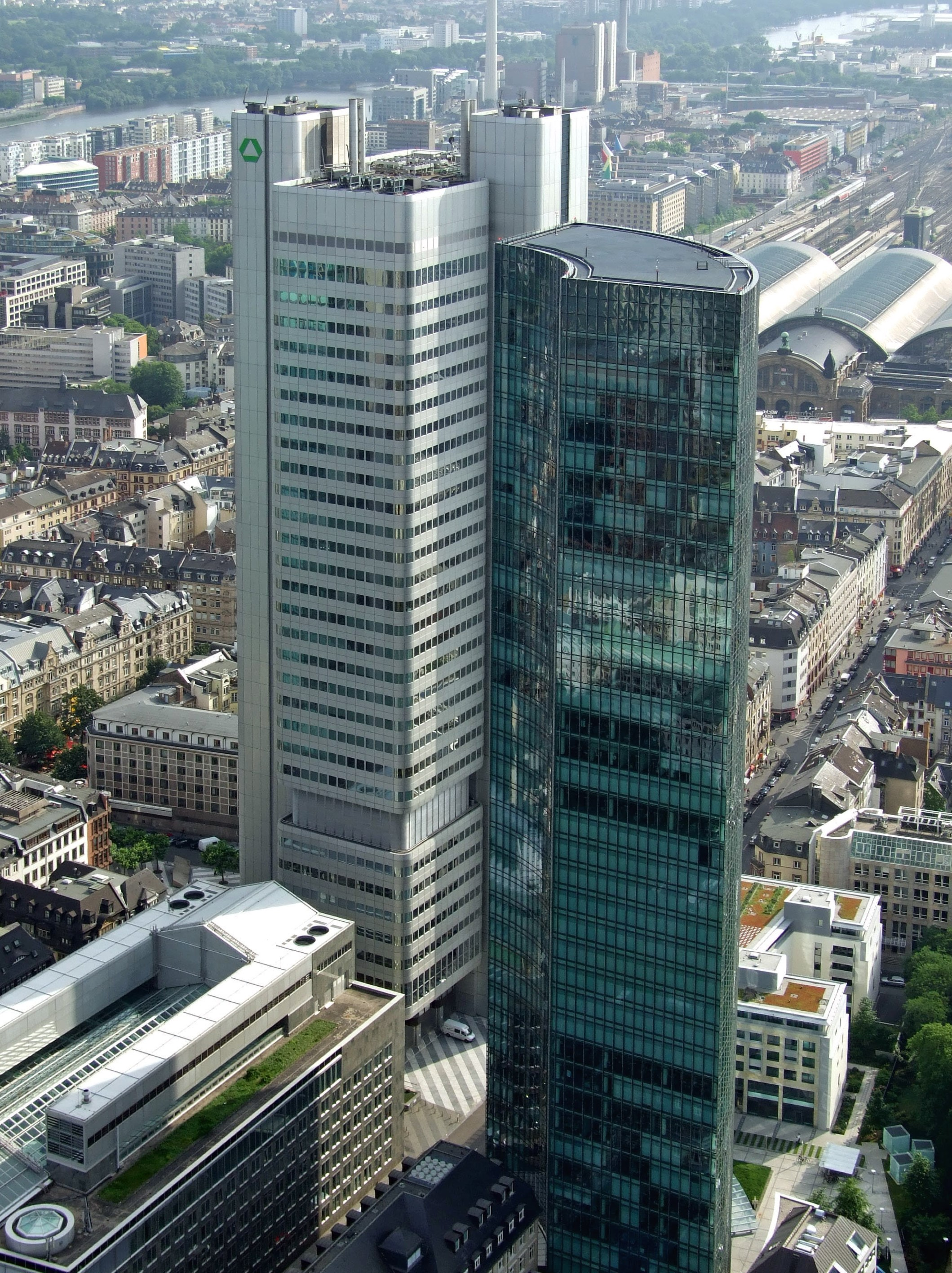 Dresdnerzentrale (Silvertower) und Skyper vom MAIN TOWER